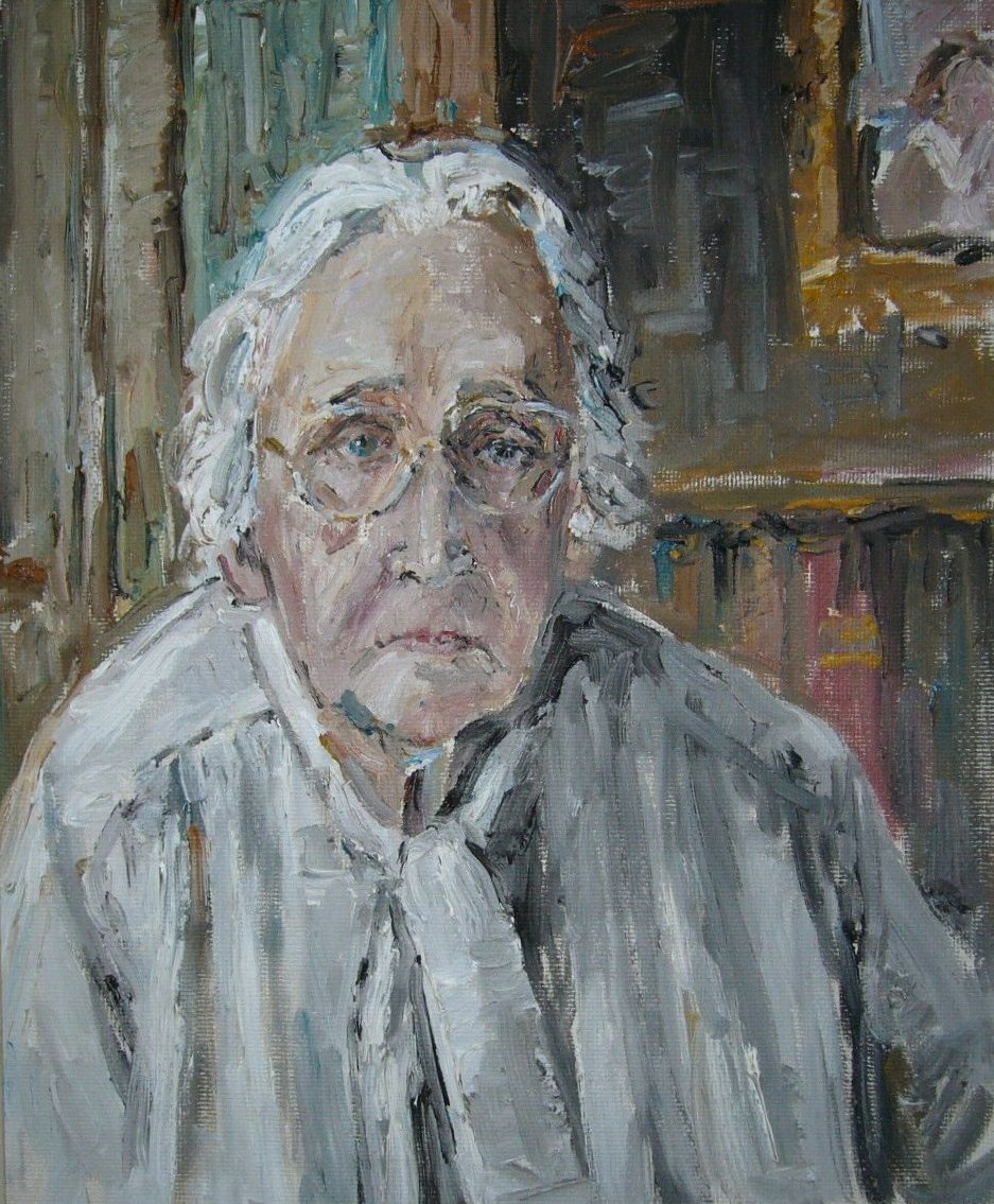 Selbstporträt, Öl auf Hartfaser, ca 50 x 60 cm